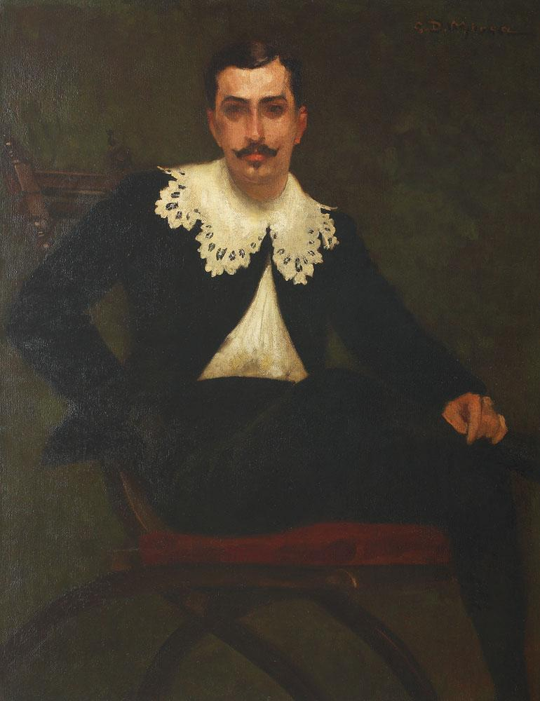 George Demetrescu Mirea -Nicolae Petraşcu în "Hidalgo", ulei pe pânză, 140x110 cm, semnat dreapta sus, cu brun, G.D. Mirea.